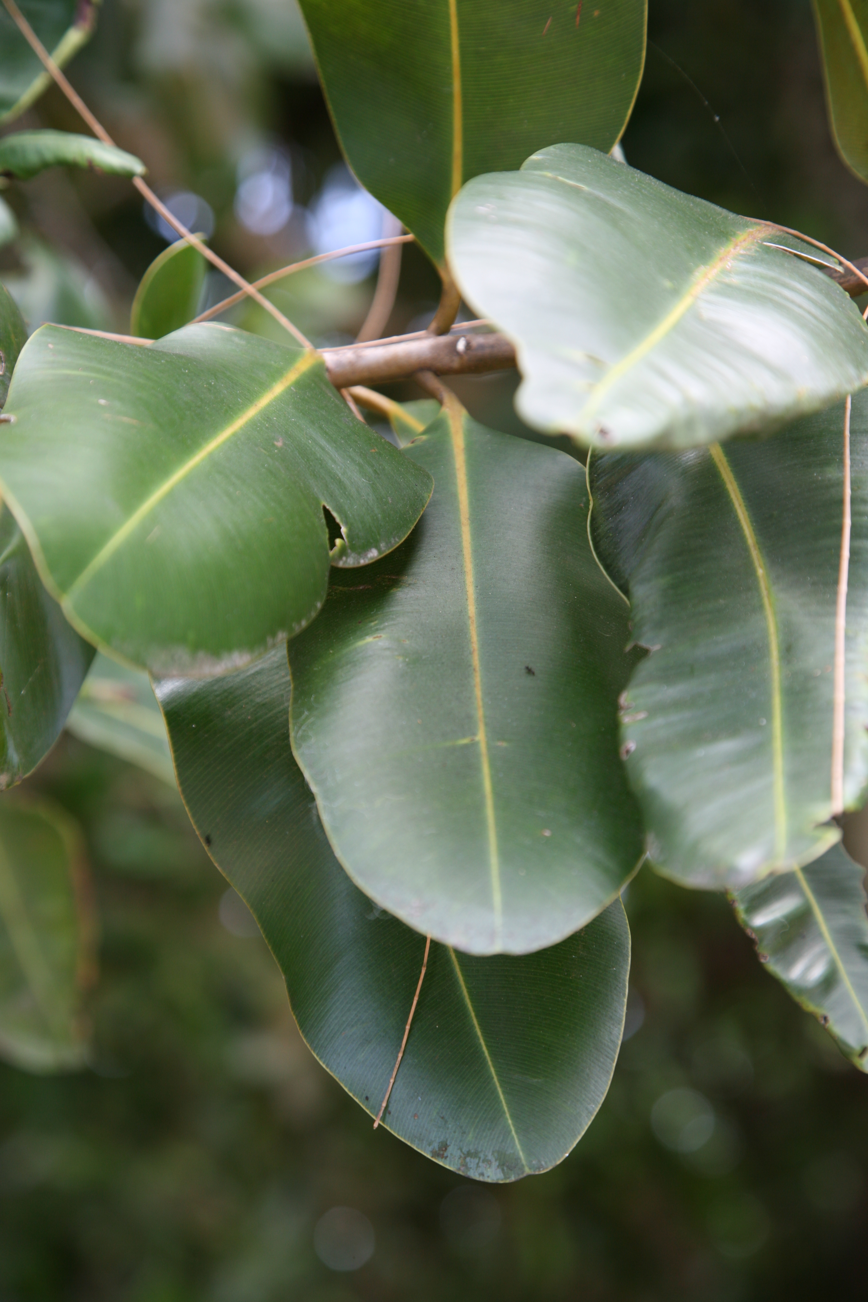 Appelé communément tamanu, son usage est répandu en Polynésie française, notamment aux Marquises, pour ses propriétés cicatrisantes et en dermocosmétique